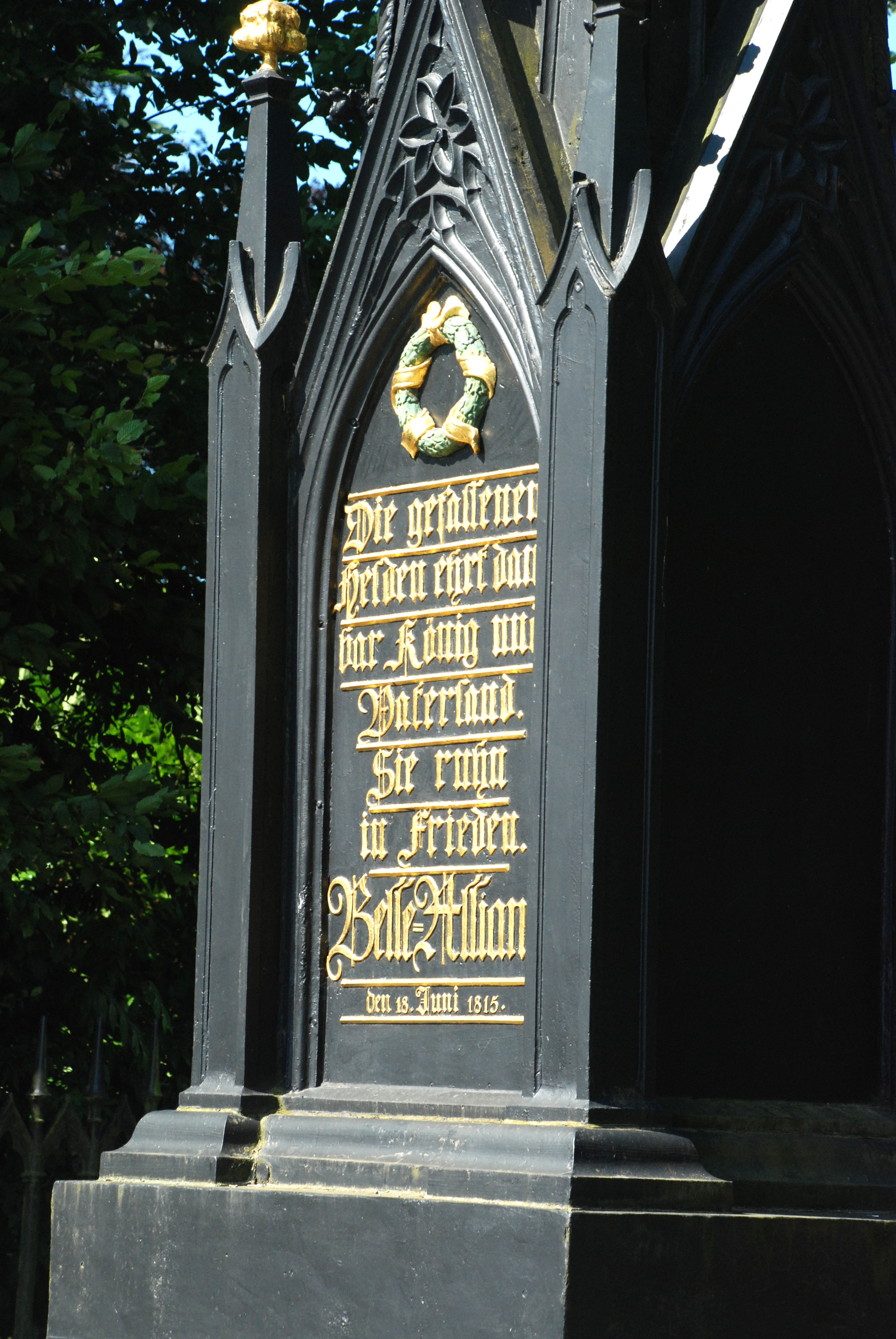 Belgique - Brabant wallon - Lasne - Monument prussien